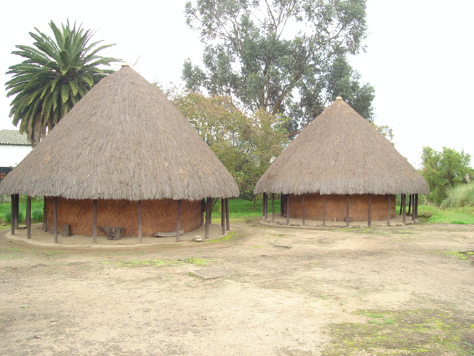 Sección del Parque Arqueológico de Sogamos. Foto: Ricardo Rodríguez Q.